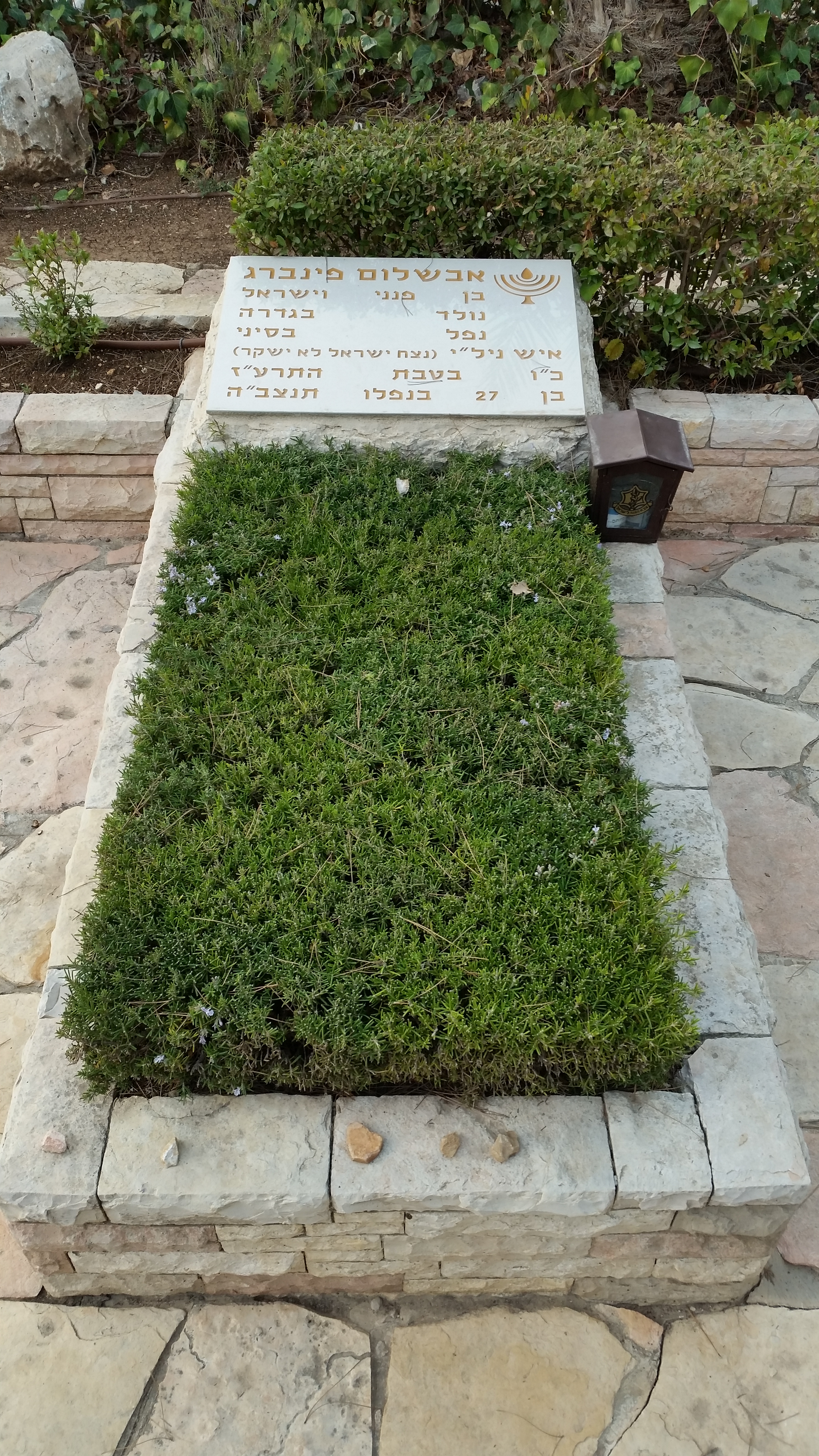 קבר אבשלום פיינברג, הר הרצל